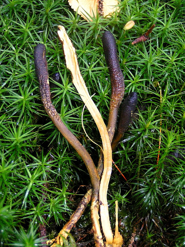 Cordyceps ophioglossoides - Clavicipitaceae